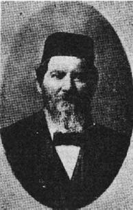 המצולם הוא רבם של אנ"ש חב"ד יפו